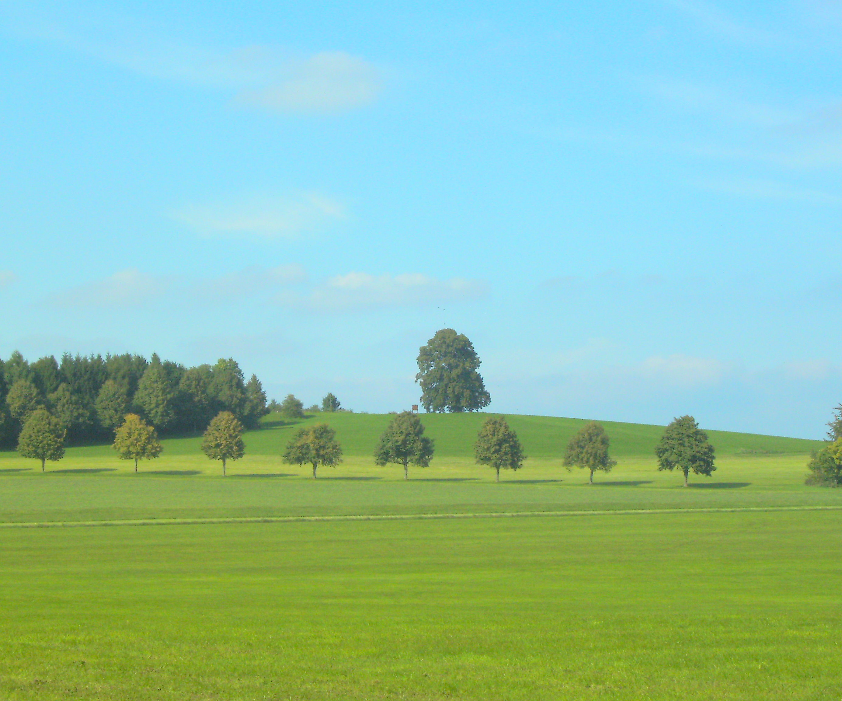 Wachbühl